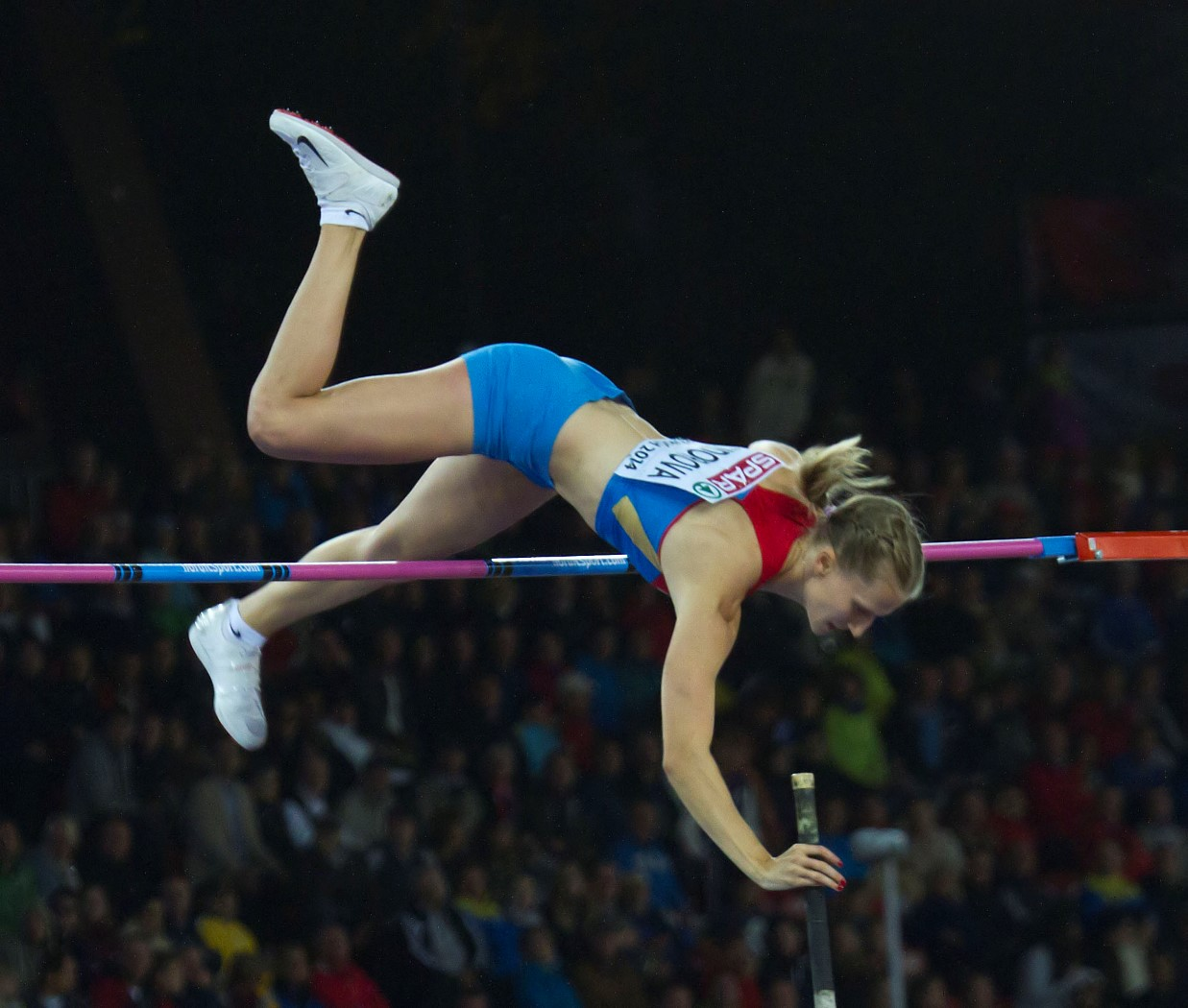 9081 sidorova over 4m65